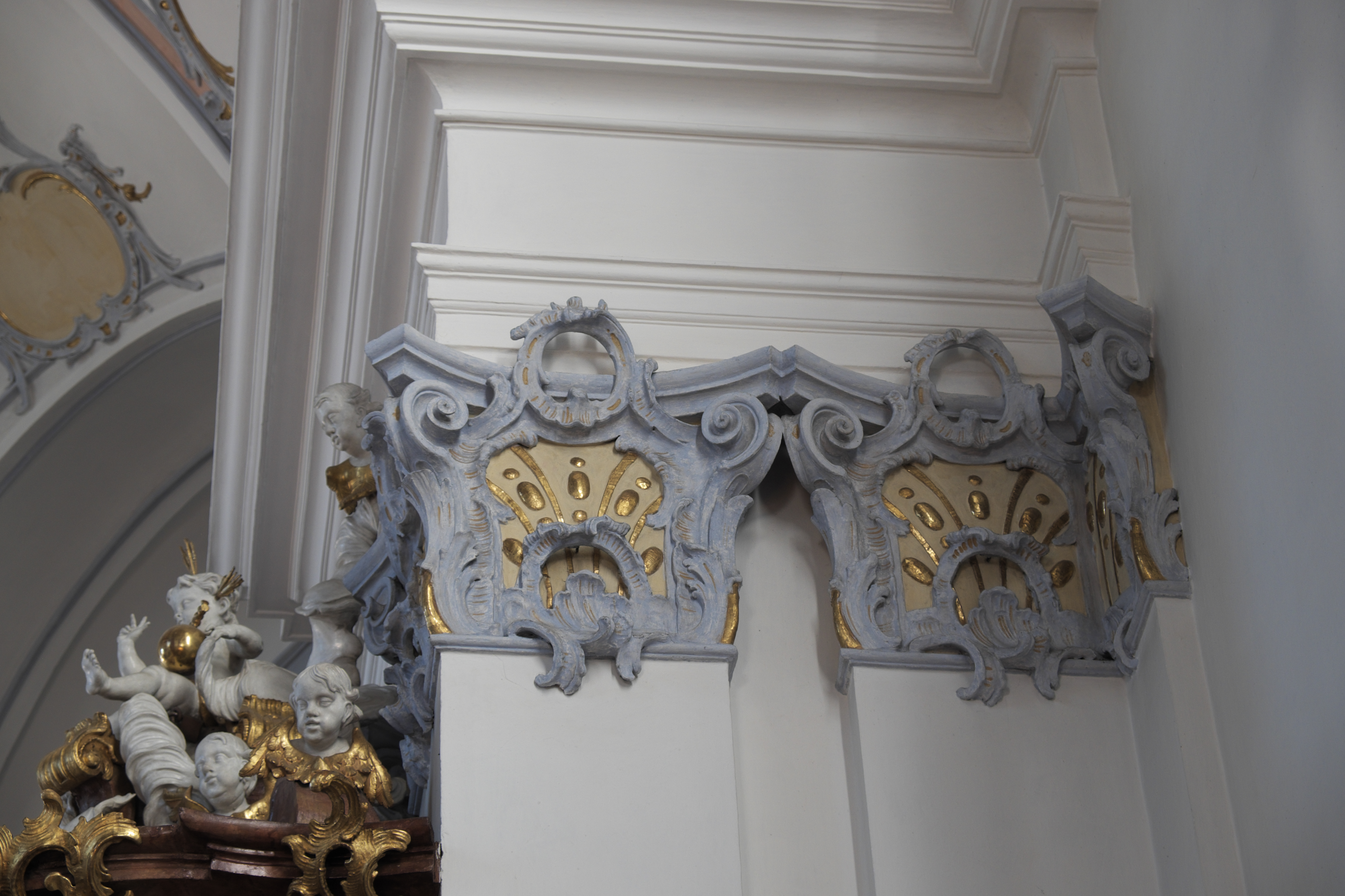 Katholische Pfarrkirche St. Johannes Baptist in Inning am Ammersee im Landkreis Starnberg (Bayern/Deutschland), Stuckkapitelle